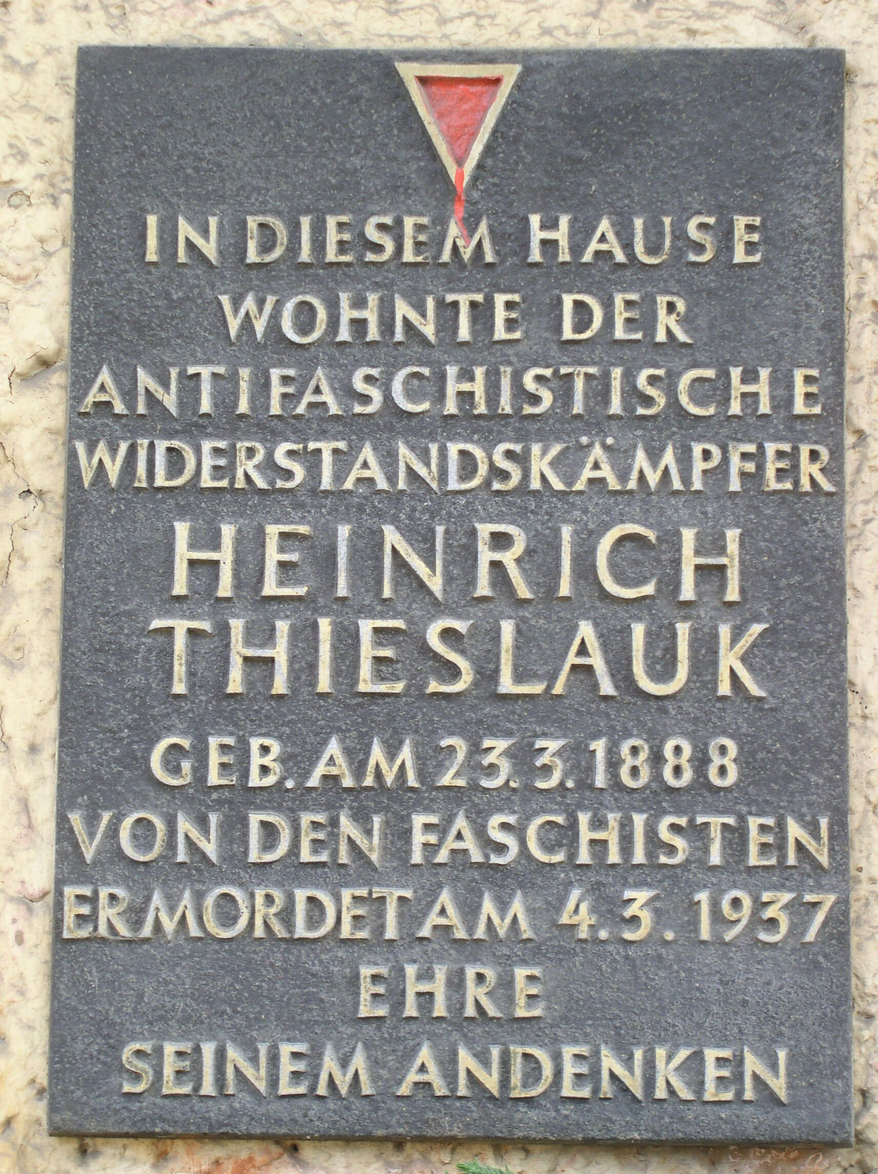 Gedenkschild für Heinrich Thieslauk an der Warschauer Straße in Berlin-Friedrichshain